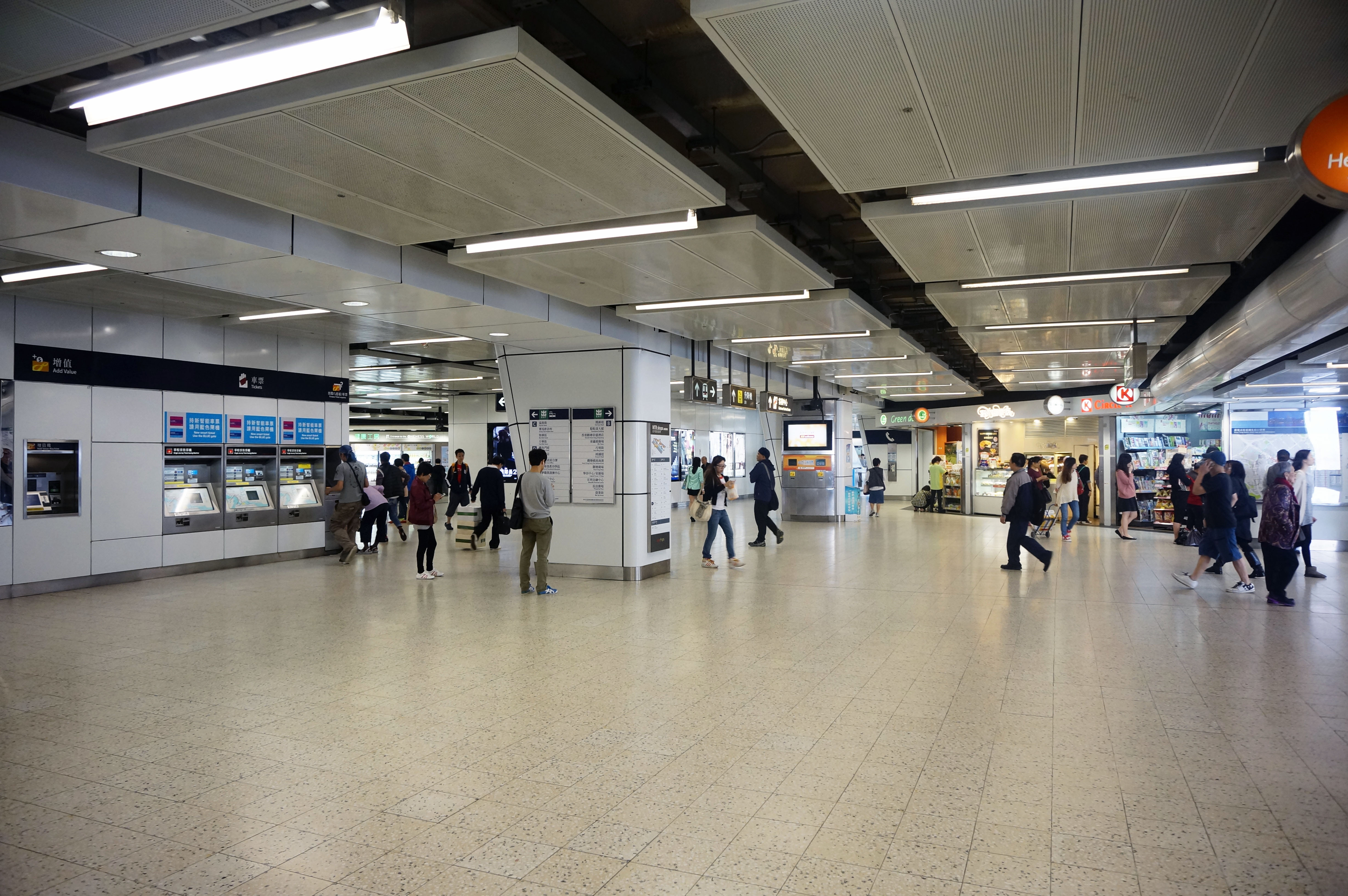 港鐵觀塘站大堂